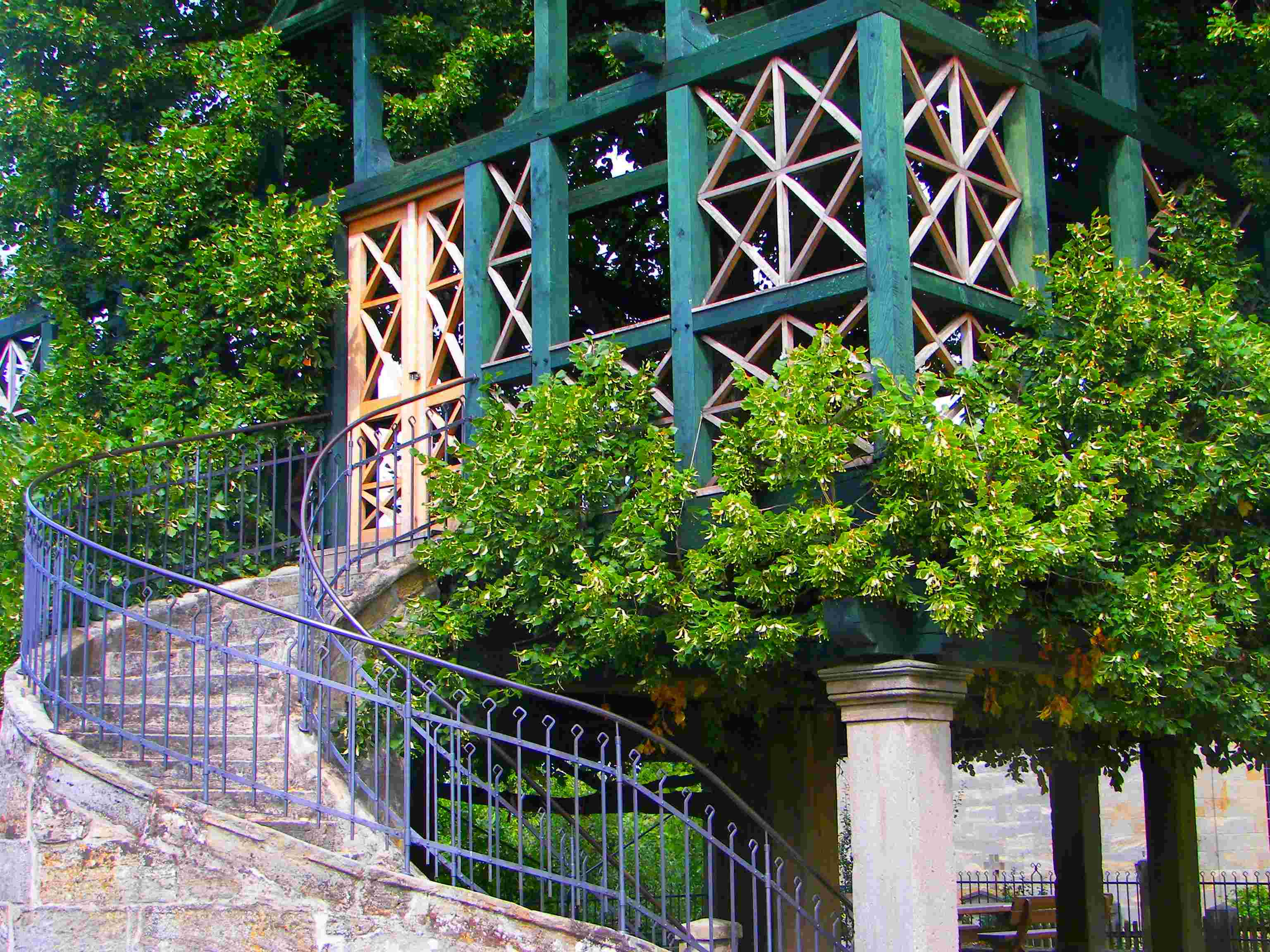 Aufgang zur Tanzlinde in Peesten, Ortsteil von Kasendorf